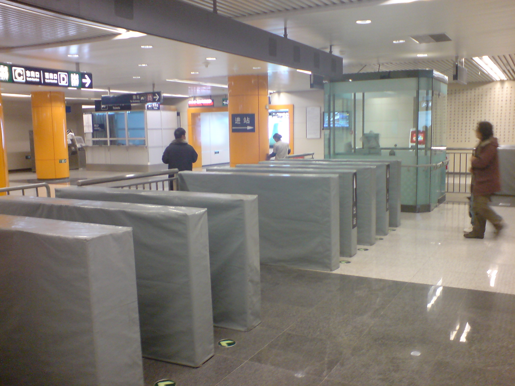 北京地铁5号线自动入闸机